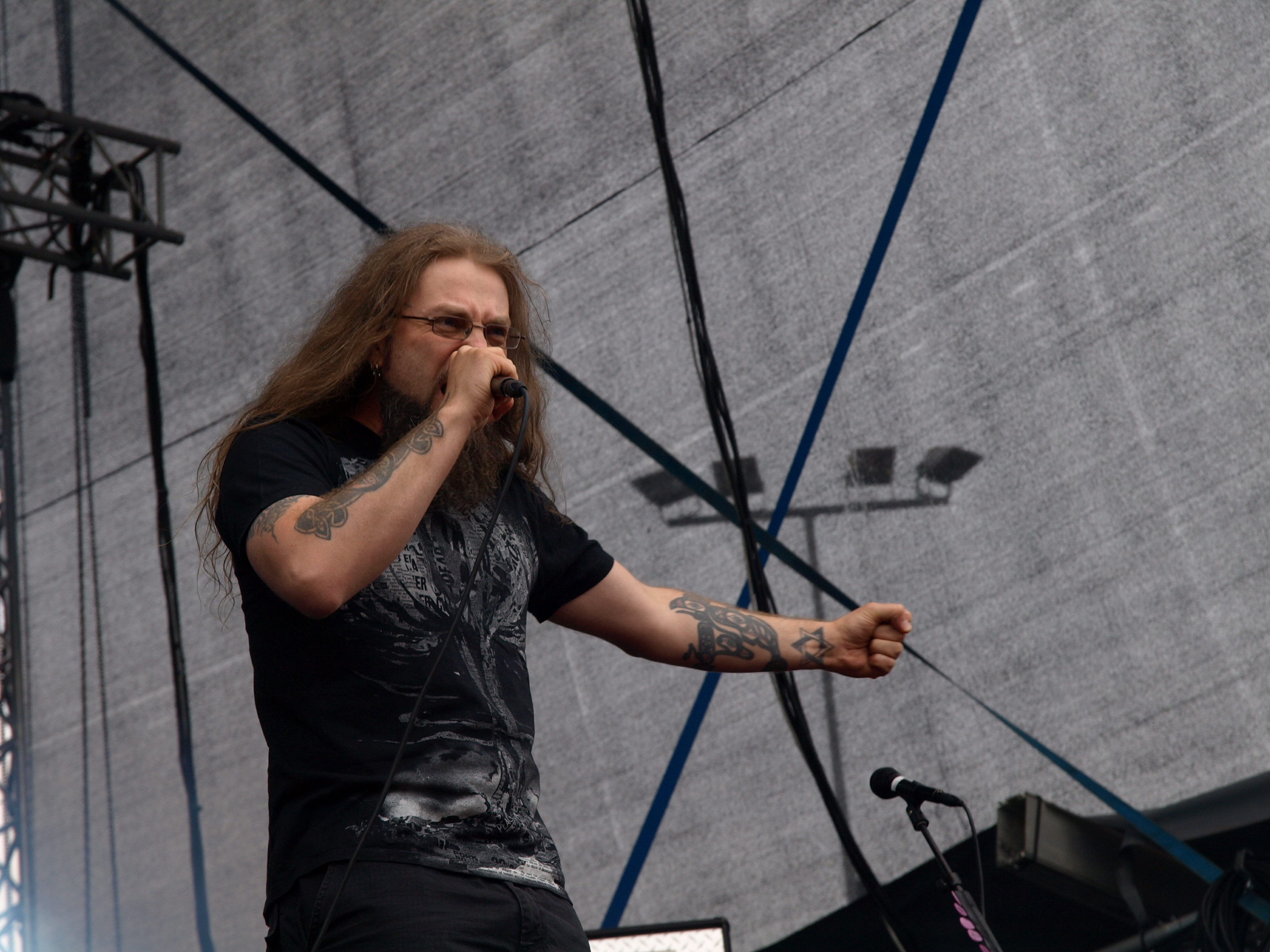 Mokoma live am Myötätuulirock 2011